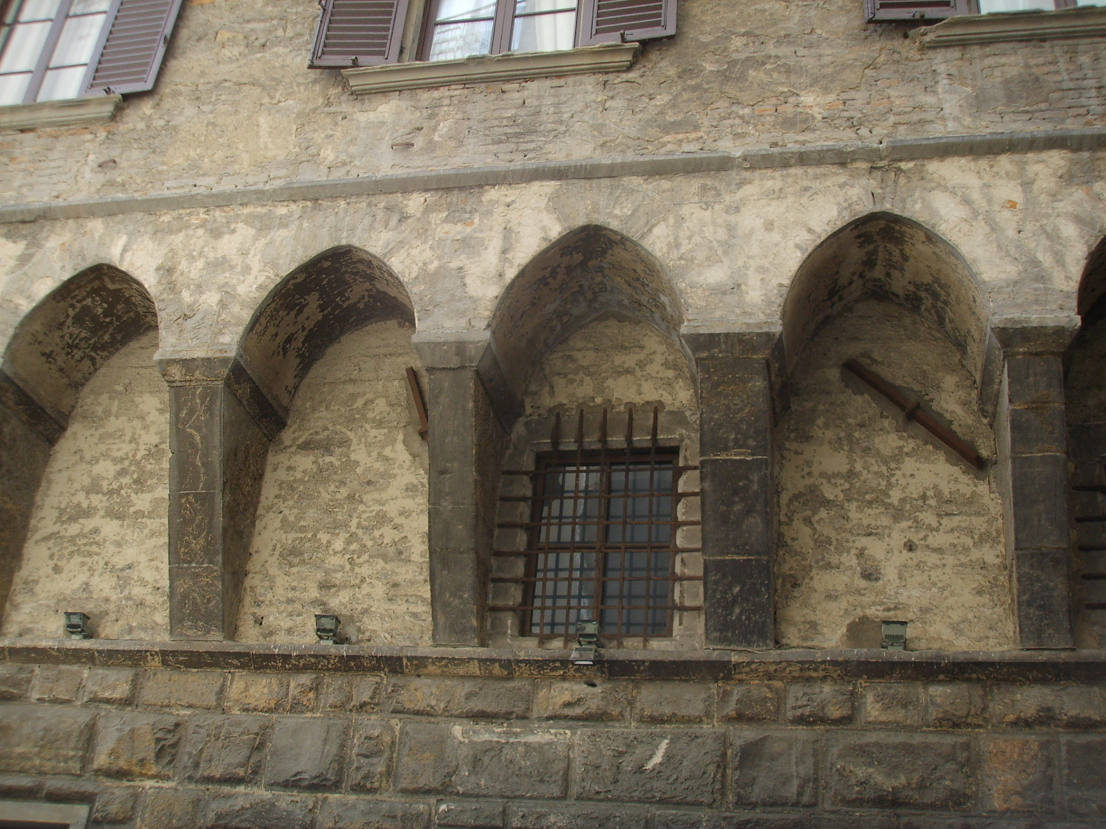 Palazzo da cintoia, beccatelli